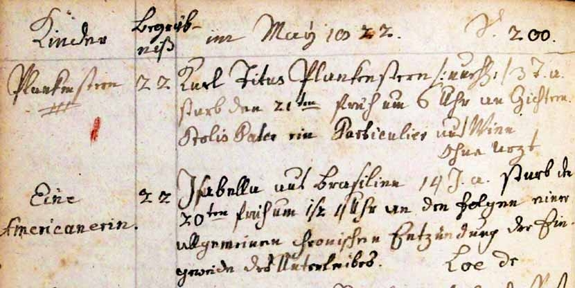 Die Inschrift lautet: Isabella aus Brasilien 14 J. a. starbden 20ten frühum 1/2 4 Uhr an den Folgen einer allgemeinenchronischen Entzündungder Eingeweide des Unterleibs. Sterbebuch der Pfarrei Zu unserer Lieben Frau, Archiv des Erzbistuns München und Freising, Martikel 72, 200